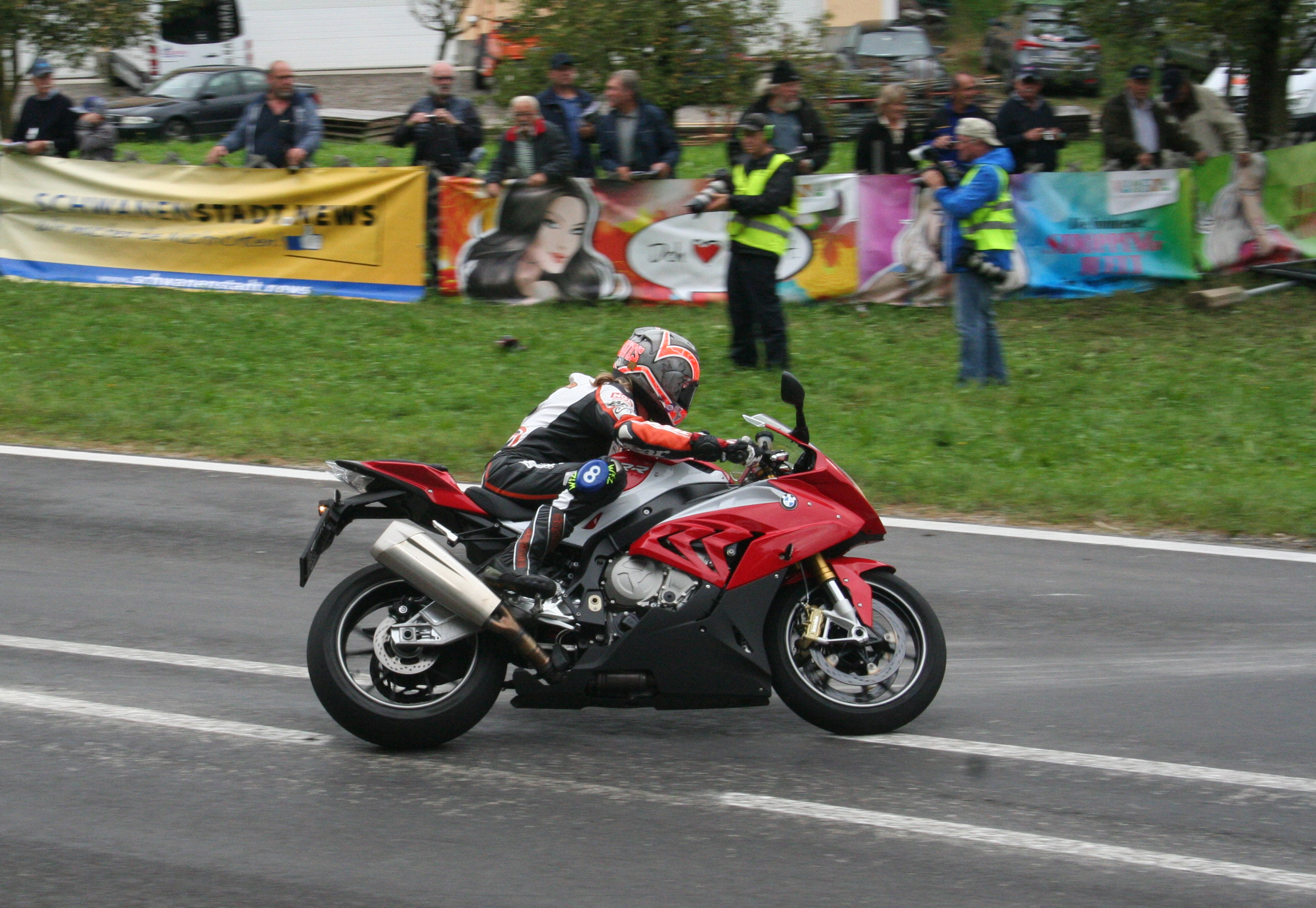 Maria Costello MBE, auf einer BMW S 1000 RR, Baujahr 2016 (1000 ccm, 200 PS), beim Oldtimer Grand Prix 2016 in Schwanenstadt